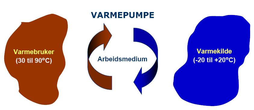 varmepumpe prinsippskisse